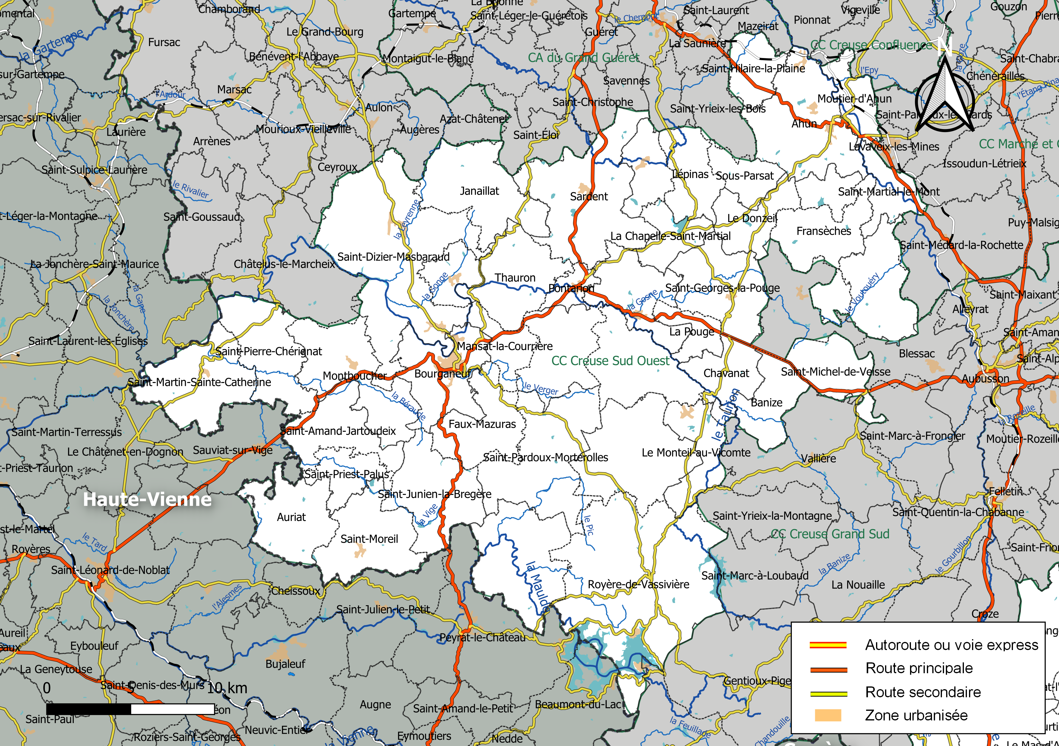 Carte géographique de la Communauté de communes Creuse Sud-Ouest, département de la Creuse, France. Composition au 1er janvier 2019.